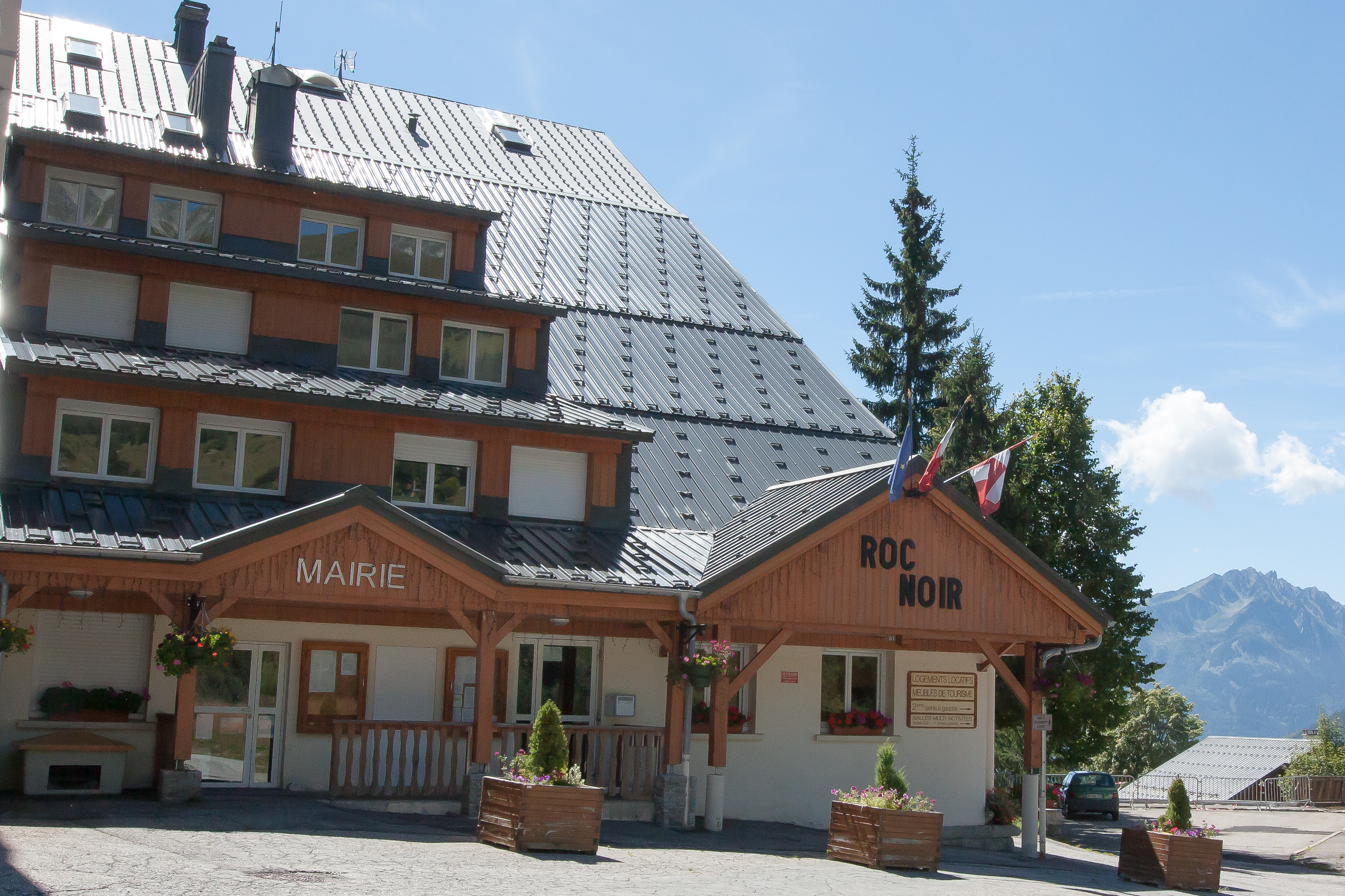 Mairie de Saint-François-Longchamp / Savoie / France